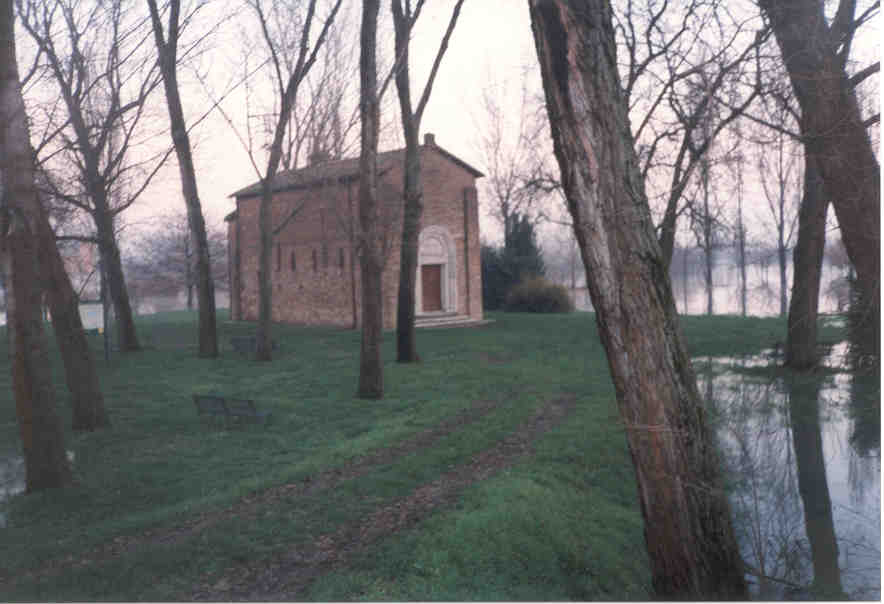 È una foto che ho scattato alla Pieve di San Giorgio. La Pieve di San Giorgio si trova a 1 km da Argenta ed è considerata la chiesa più antica della provincia di Ferrara. La fotografia è stata scattata con una fotocamera Kodak.